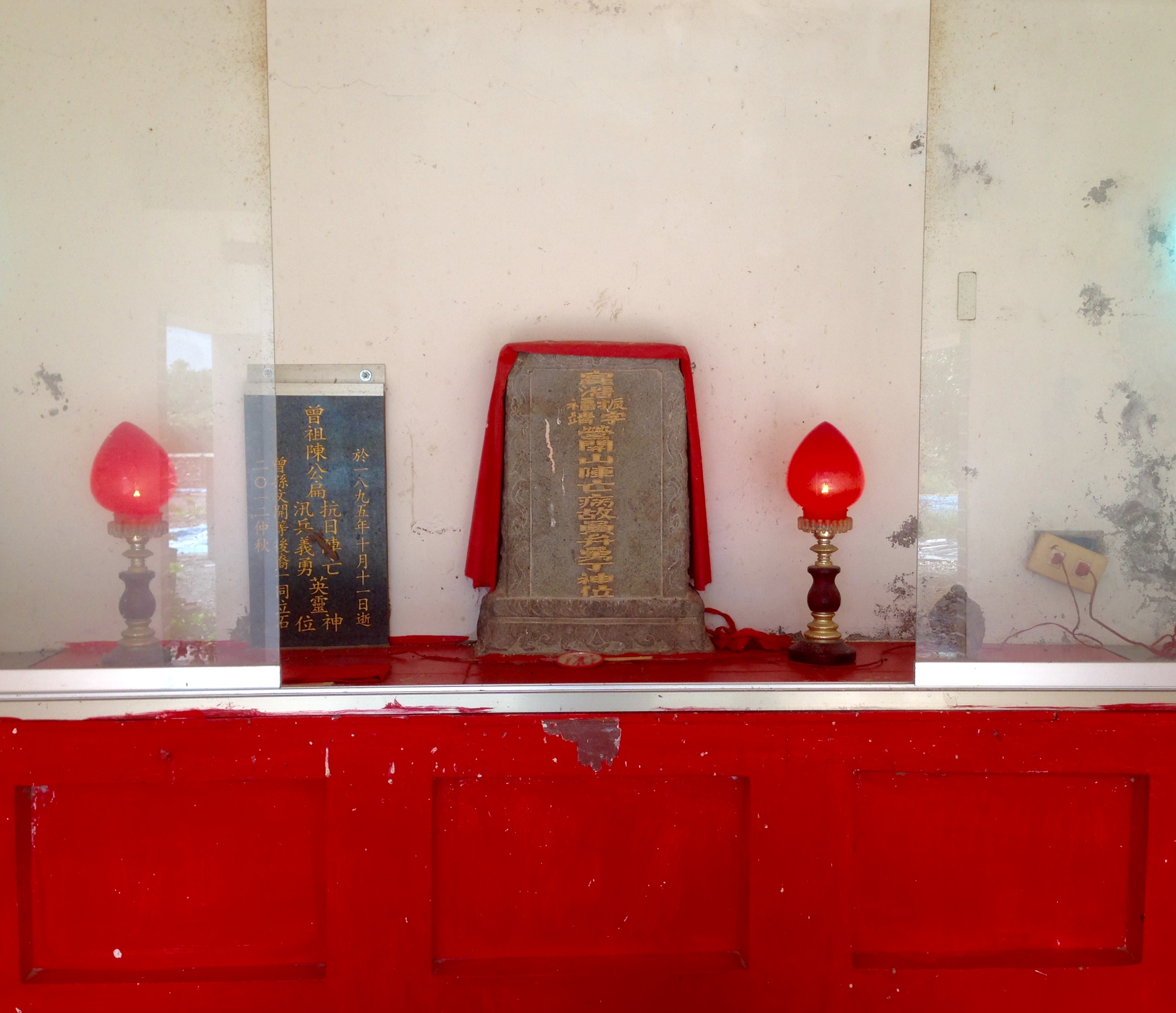 中文（台灣）: 忠英祠牌位